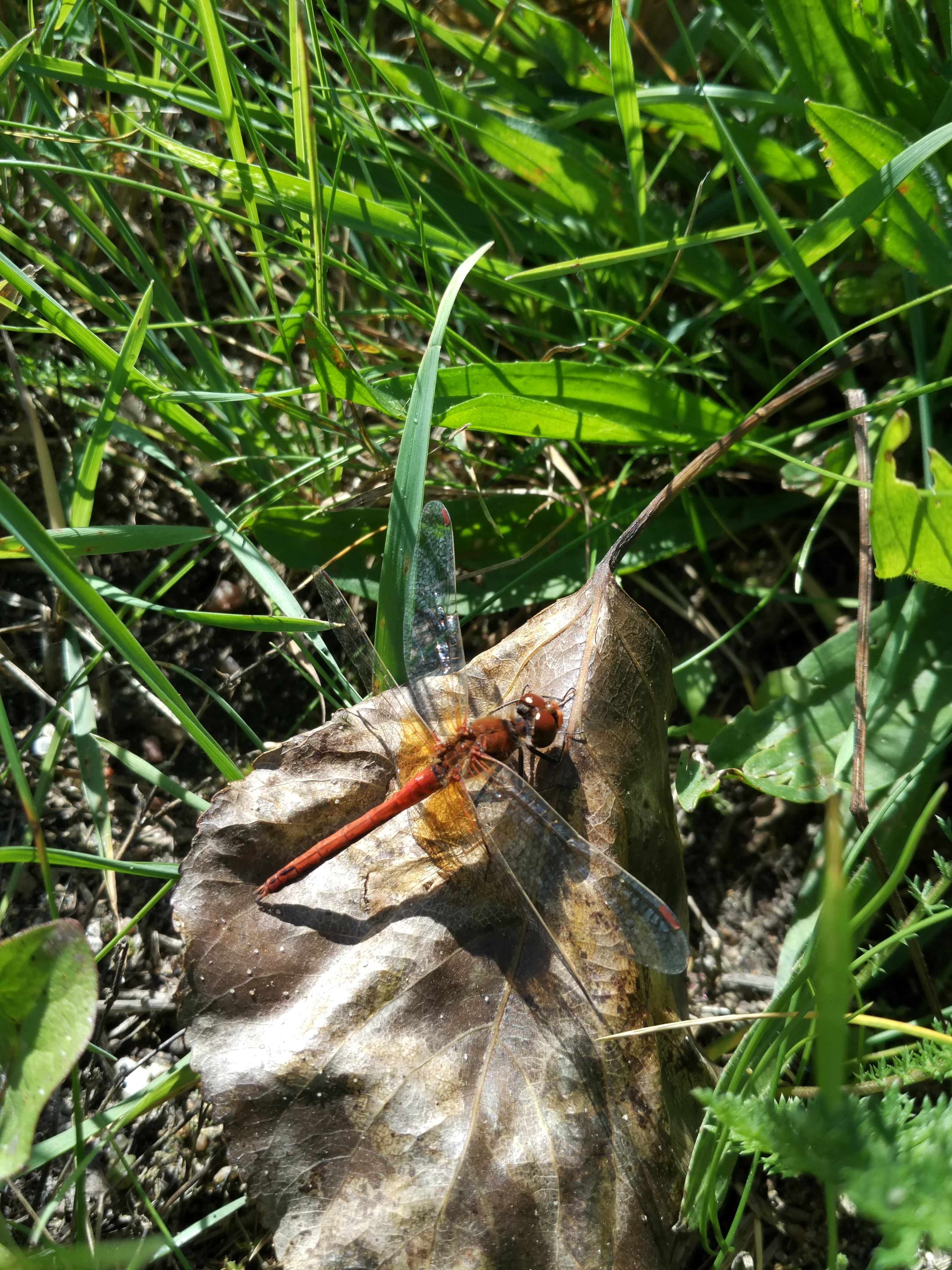 Невядомая страказа ў Севастопальскім парку, знята 12 жніўня